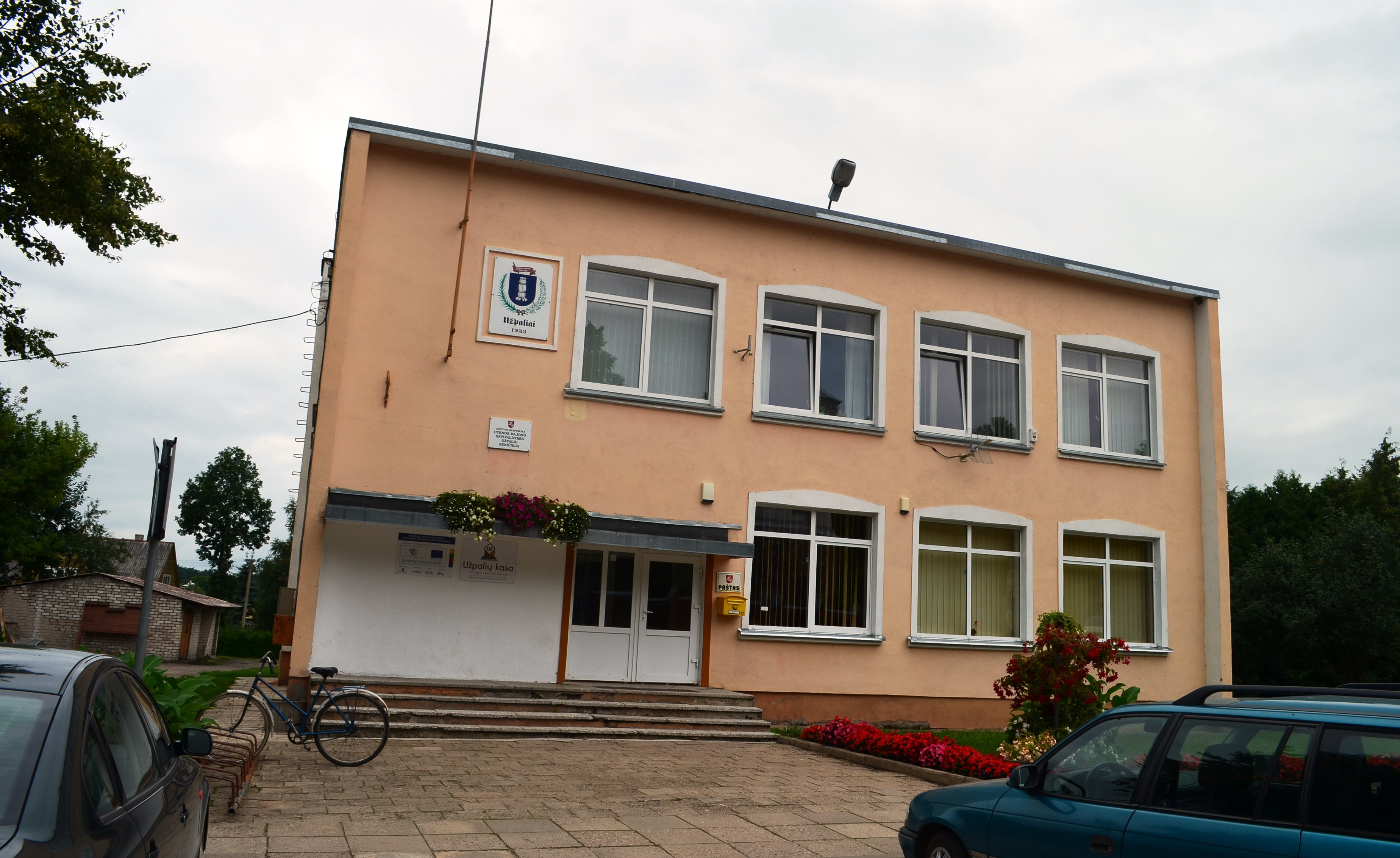 Seniūnija, Užpaliai, Utenos r.